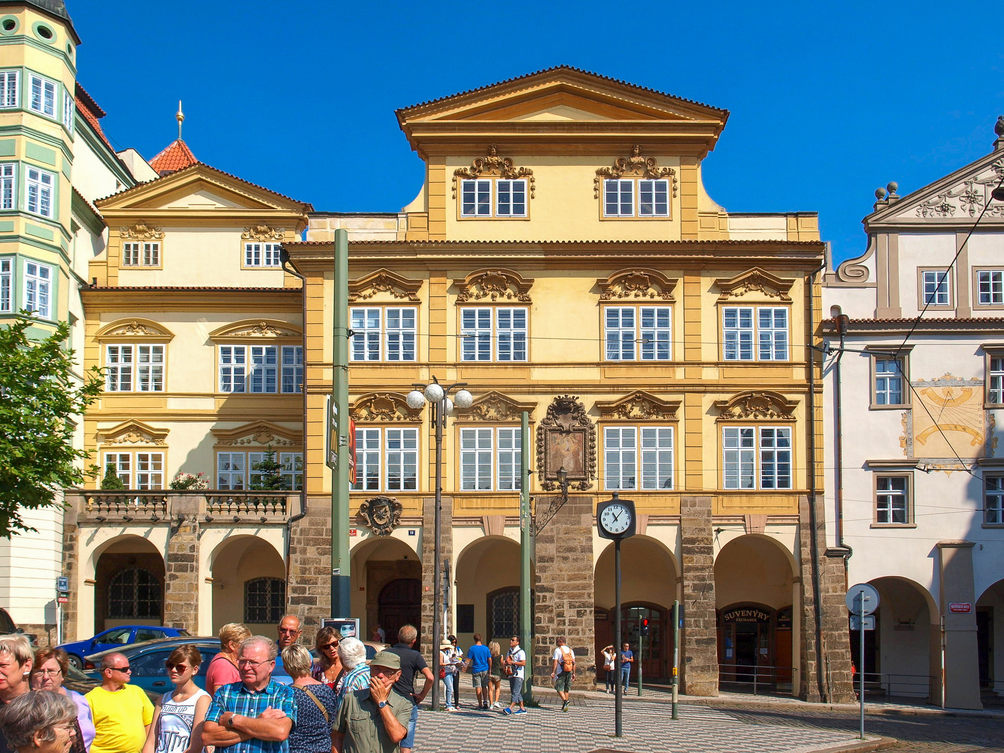 Šternberský palác na Malostranském náměstí